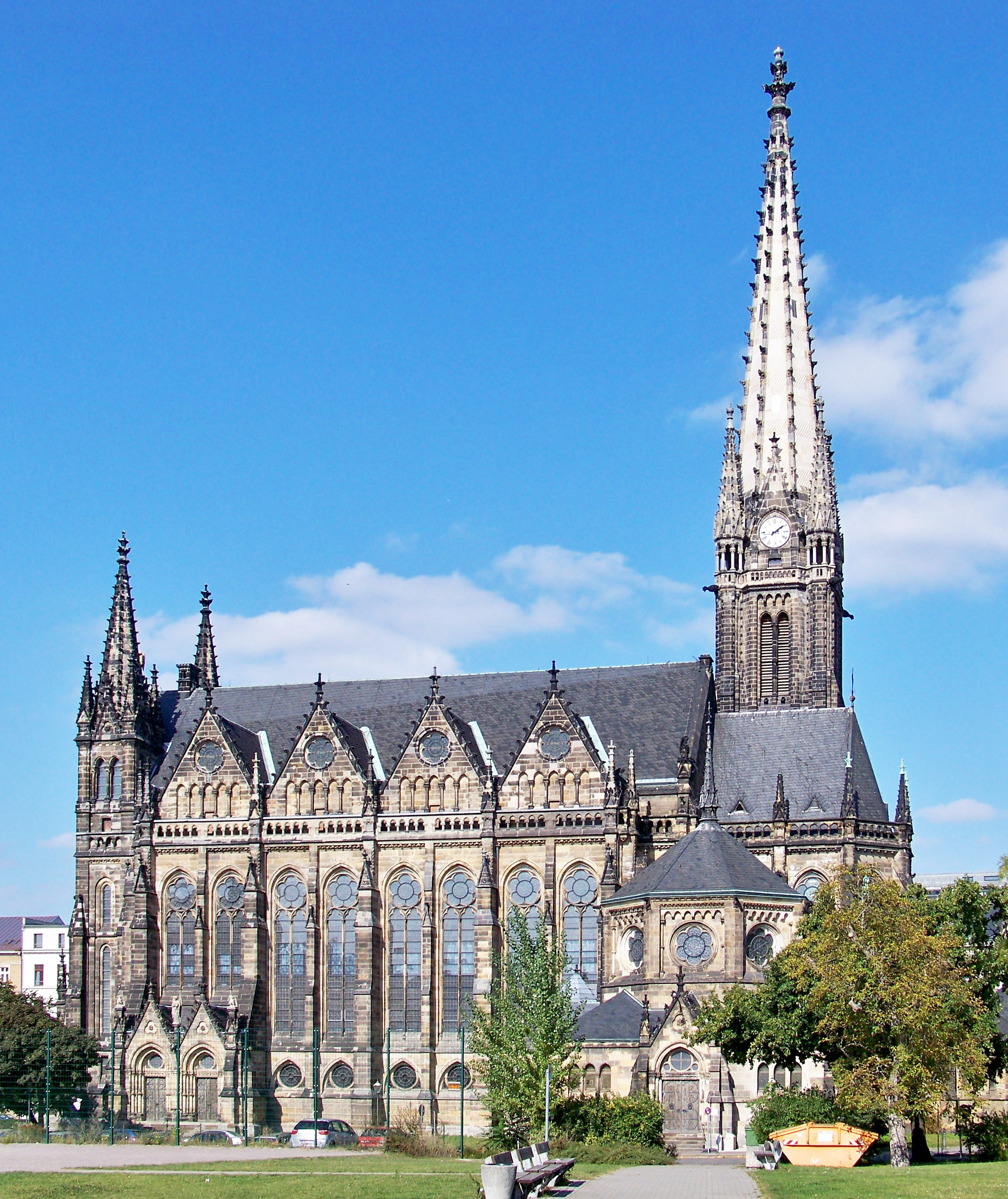 Peterskirche in Leipzig aus der Hohen Straße